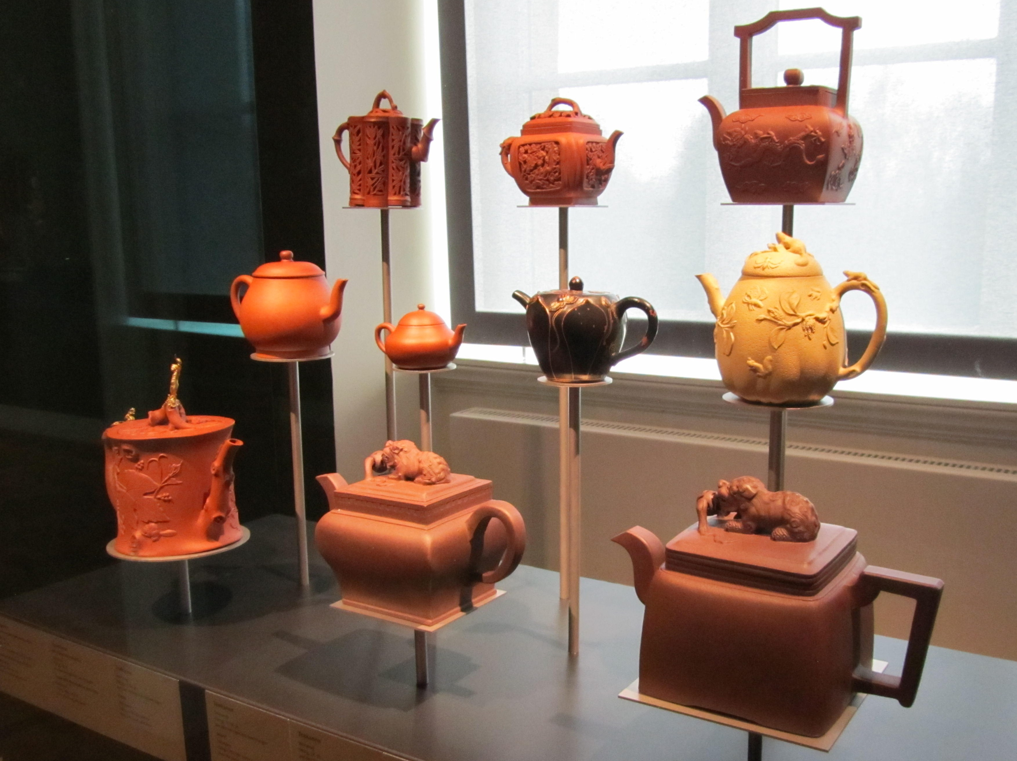 Teekannen aus Yixing, China, Steinzeug, 18. Jahrhundert, ausgestellt im Herzoglichen Museum Gotha (Thüringen).